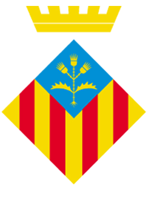 Escut oficial de la vila de Cardedeu.